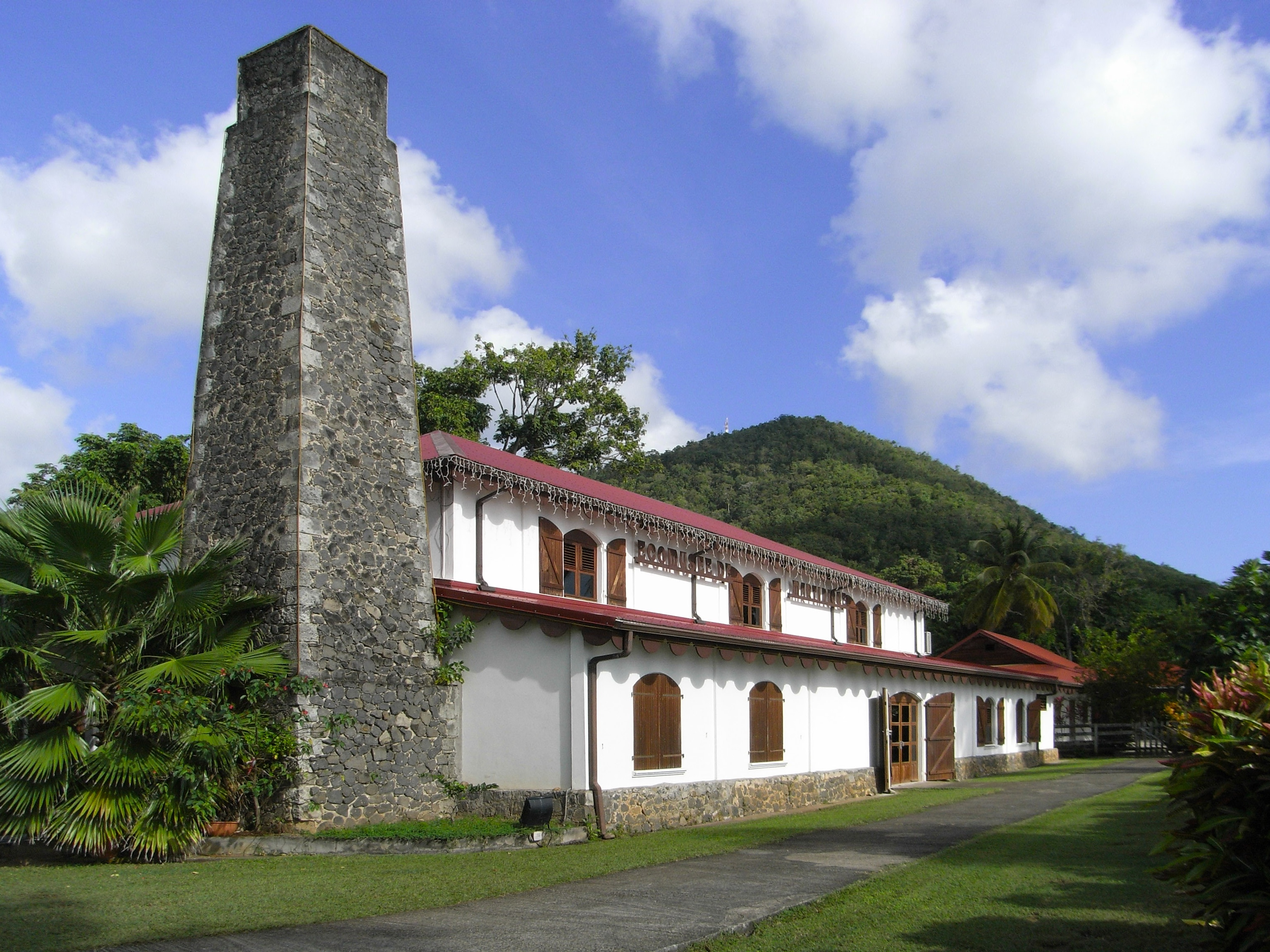 Écomusée de Martinique située sur la commune de Rivière-Pilote en Martinique (France)